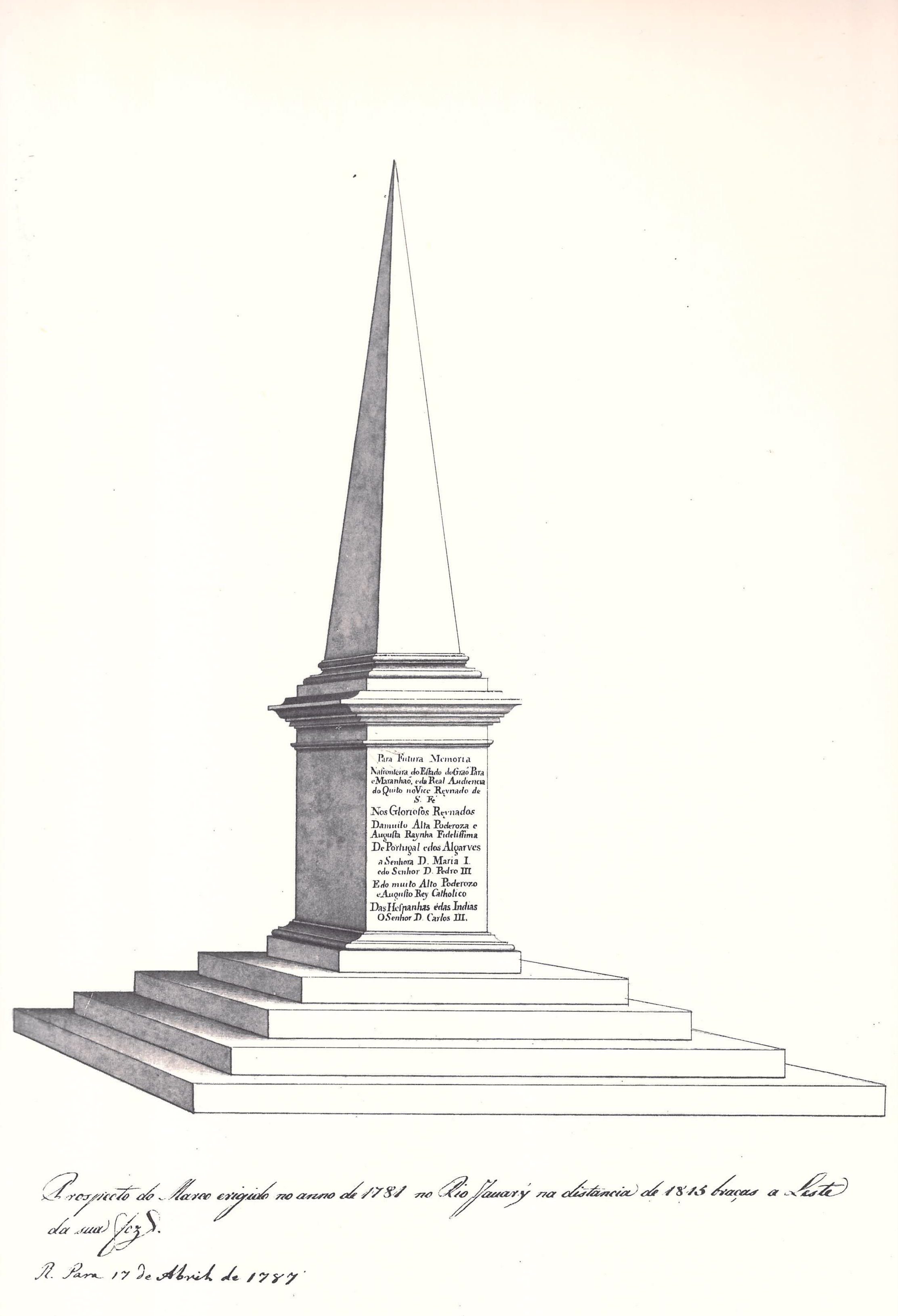 Ilustração em Viagem Filosófica pelas capitanias do Grão Pará, Rio Negro, Mato Grosso e Cuiabá.